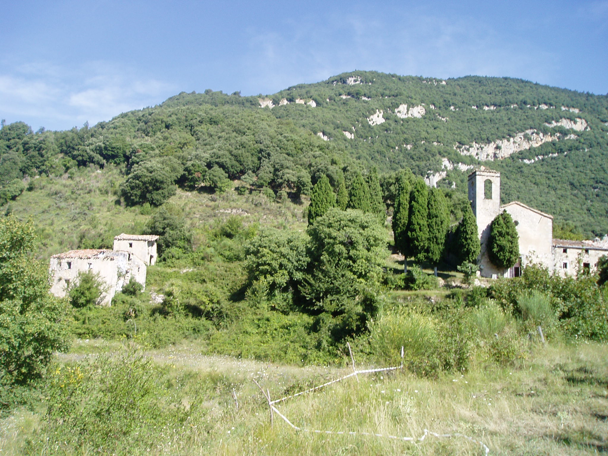 Talaixà (Alta Garrotxa) año: 2004